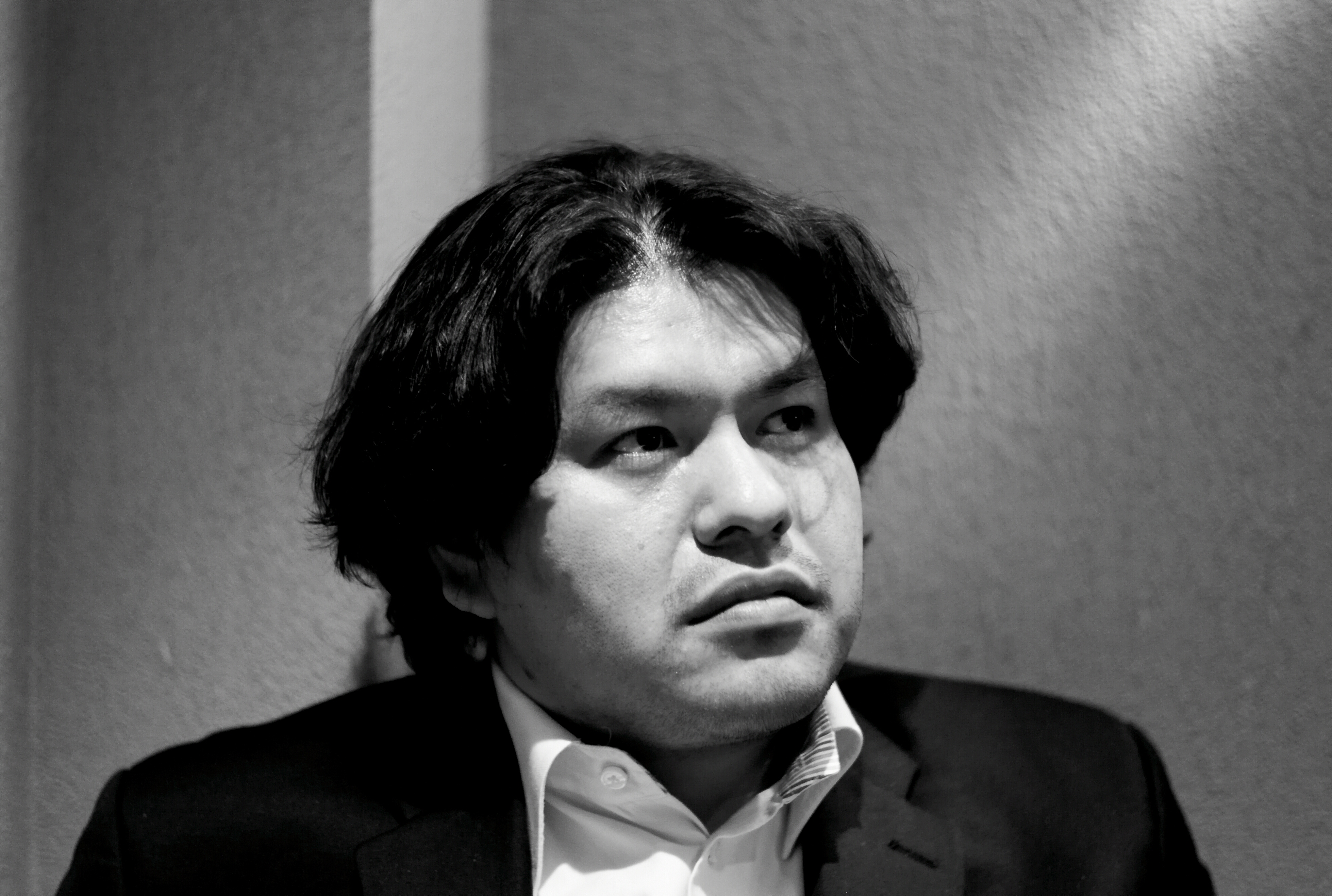 Kenji Eno